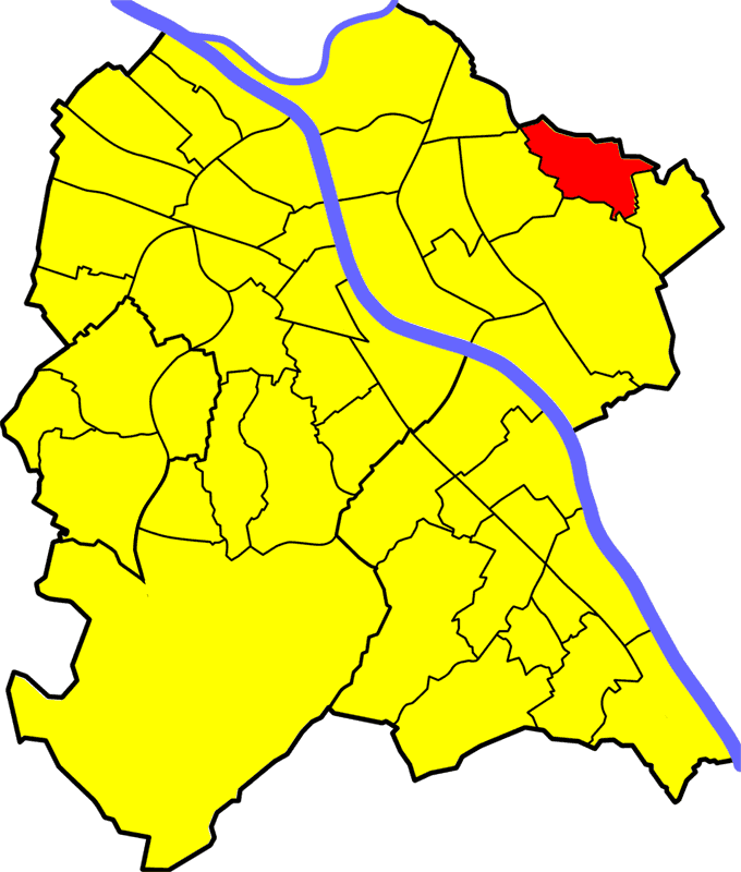 Holzlar in Bonn